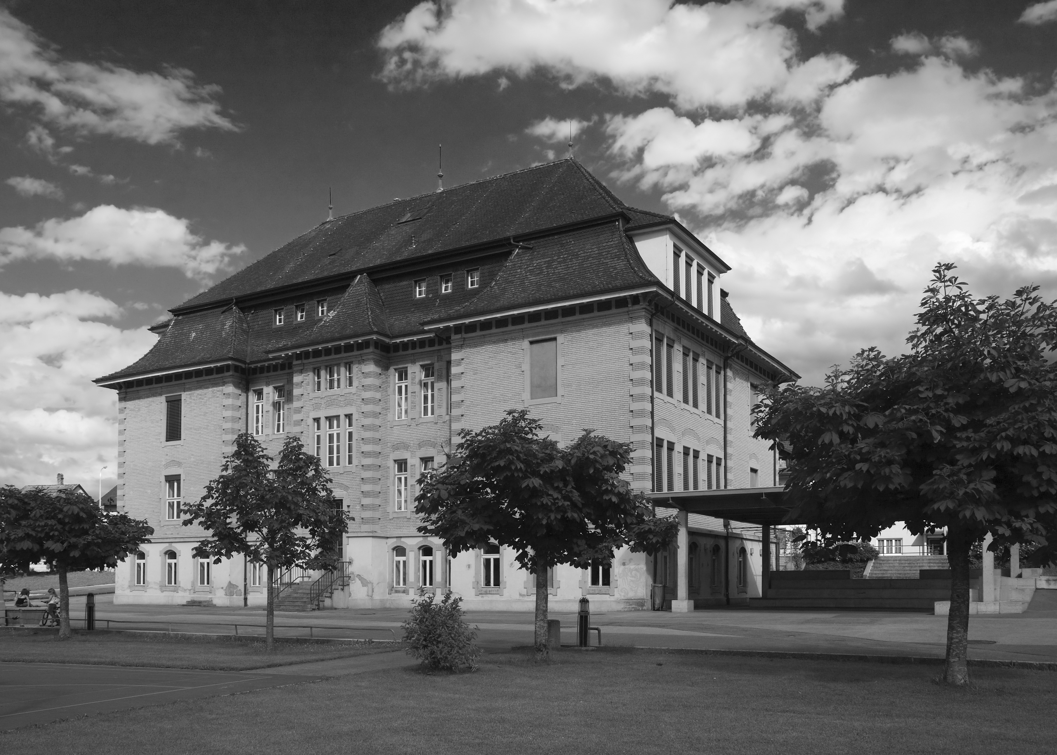 Schulhaus von Courrendlin, Schweiz